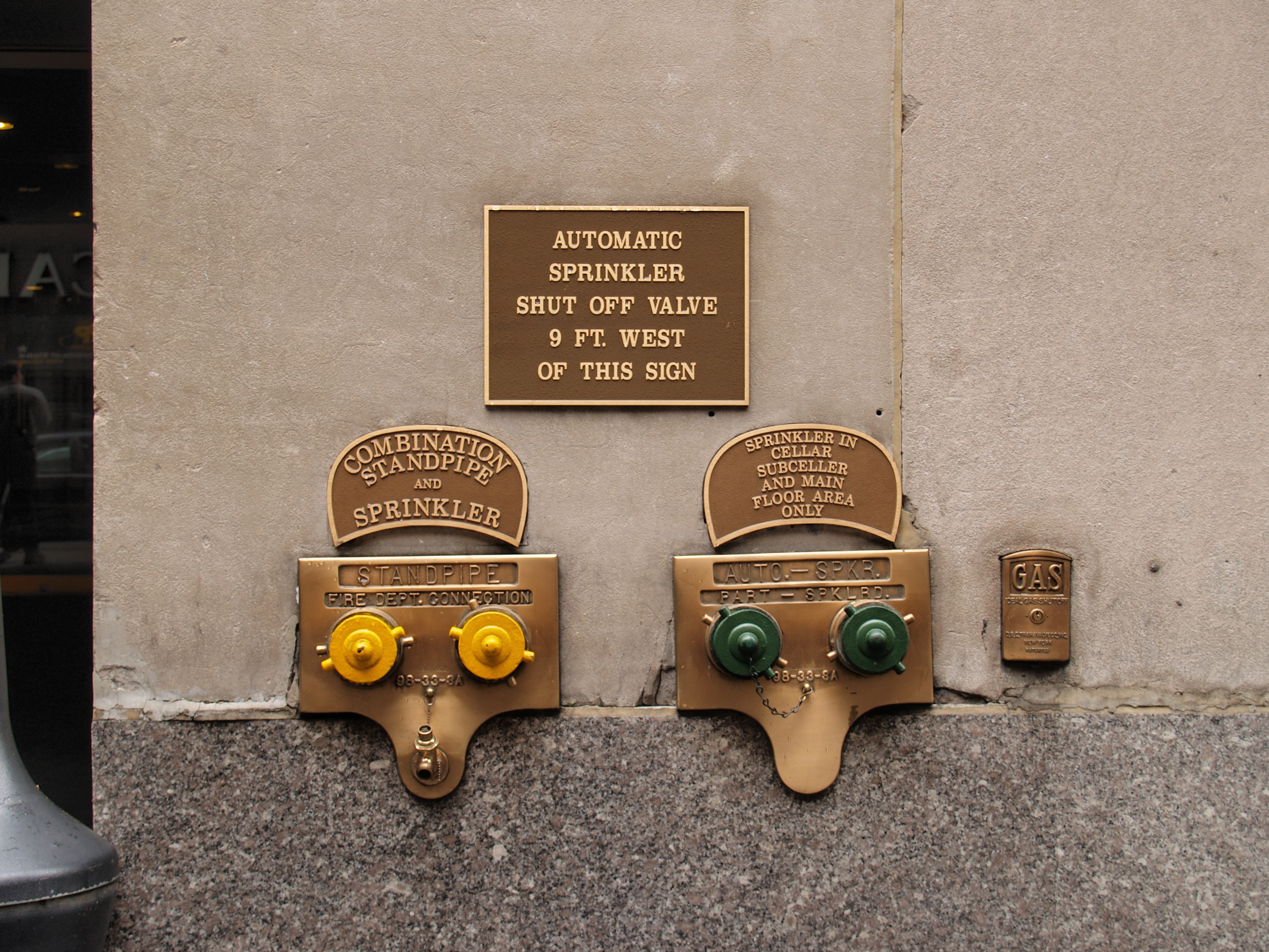 Anschluss für einen Feuerwehrschlauch, gesehen in Manhattan, New York